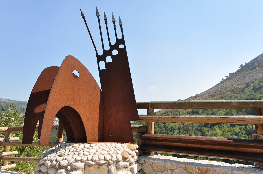 Cerreto Sannita 12 2012 Dieses Foto entstand in Zusammenarbeit mit Stadtbesichtigungen.de Die Seiten Stadtbesichtigungen.de, der dazugehörige Reise Blog sowie die Facebookseite: Stadtbesichtigungen Rom dürfen dieses Bild für Ihre Veröffentlichungen ohne den Hinweis auf Wikipedia, Commons bzw der Lizenz verwenden. Die Verantwortlichen habe von mir (Ra Boe) die Originaldaten zur freien Verfügung übermittelt bekommen.